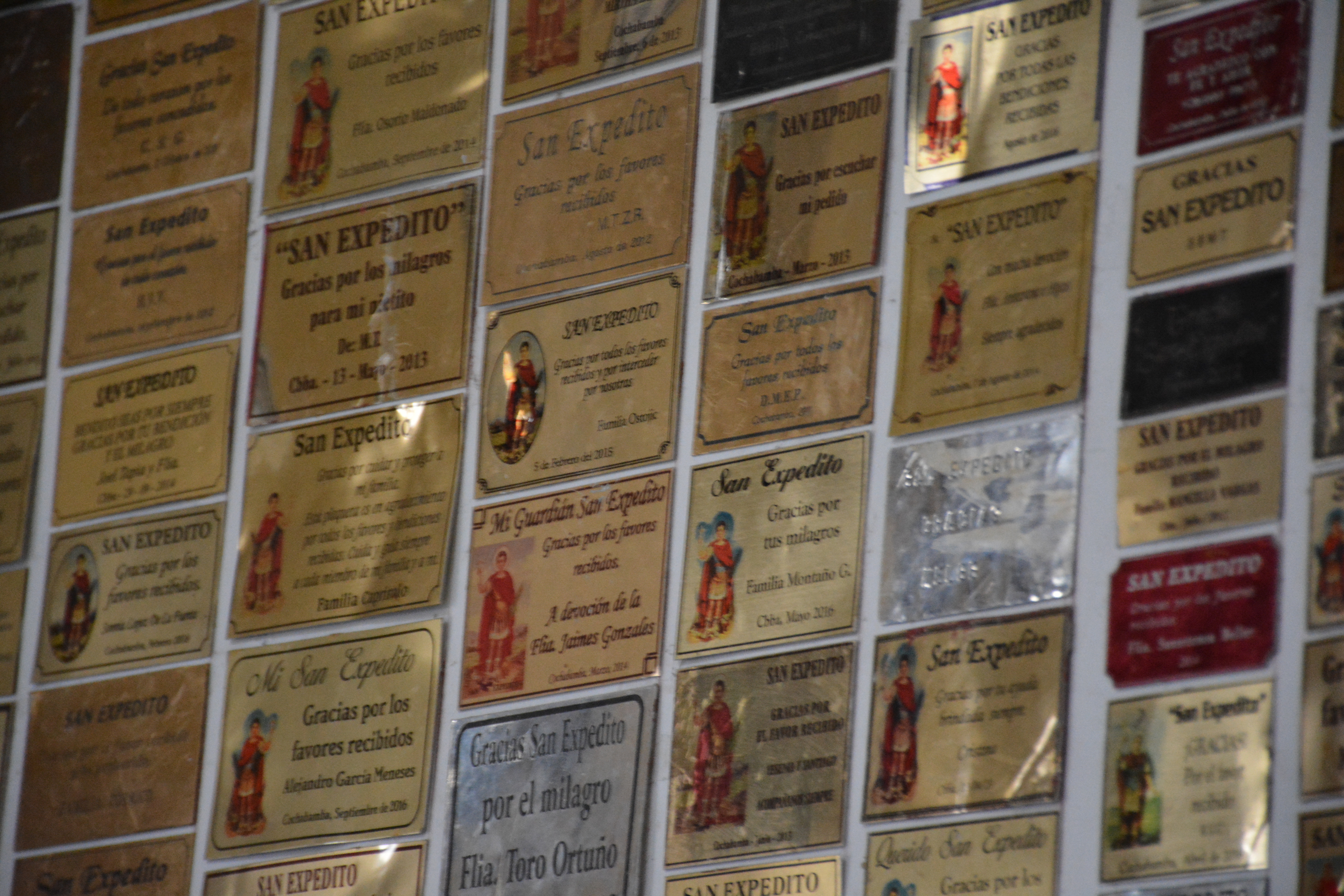 Iglesia de la Recoleta This medium shows the protected monument with the number C/00-004 in Bolivia.